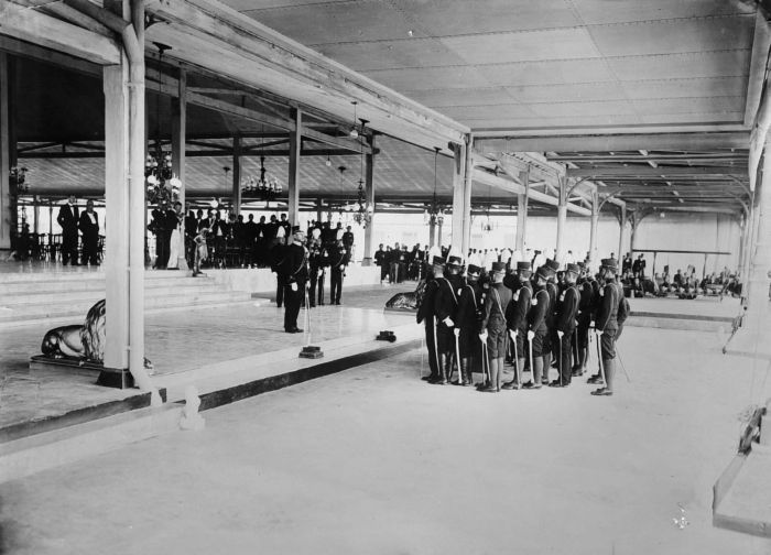 Repronegatief. Prins Mangkoe Negoro VII presenteert zichzelf aan het officierenkorps